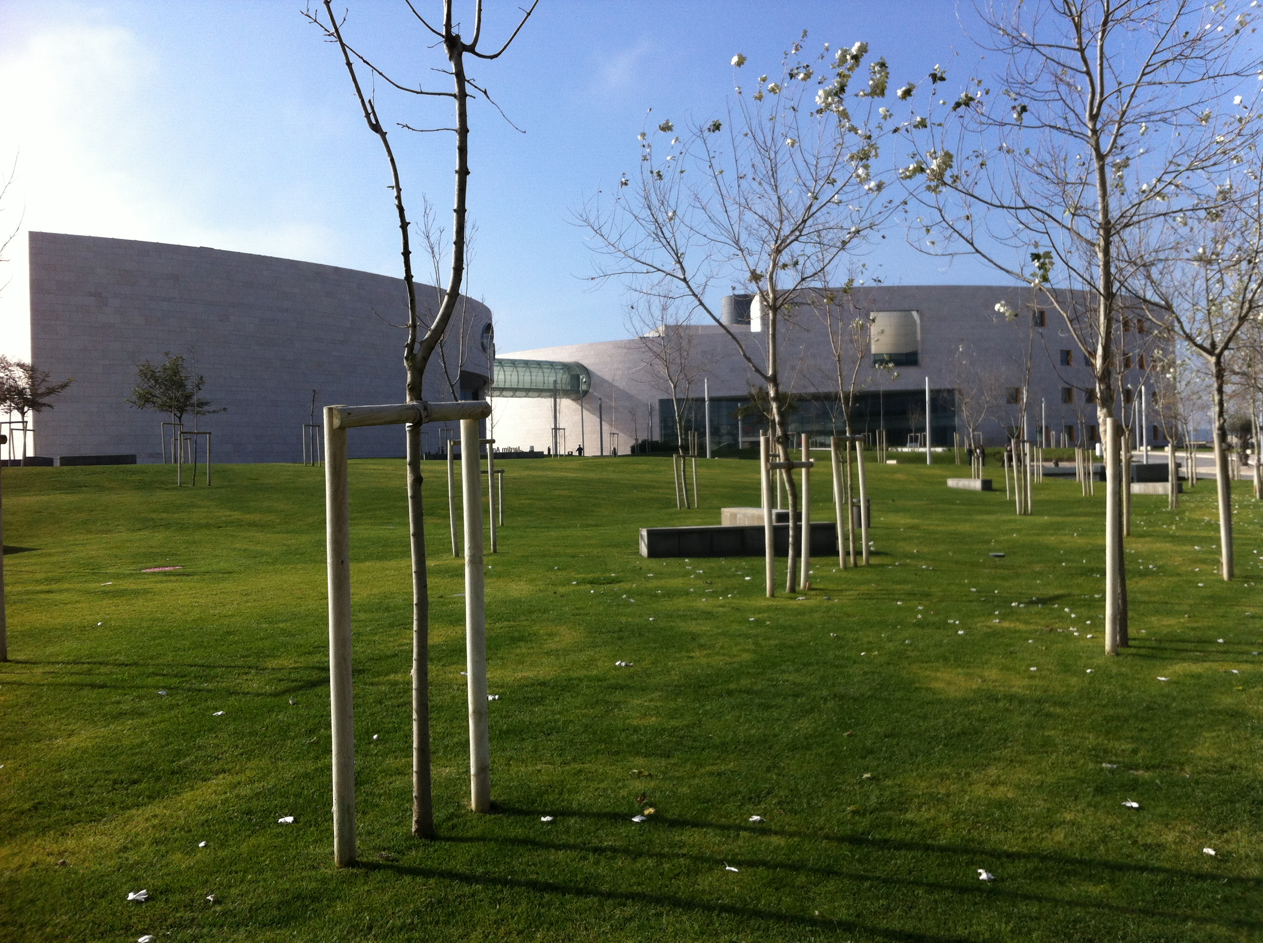 Fundação Champalimaud - Lisboa - Portugal